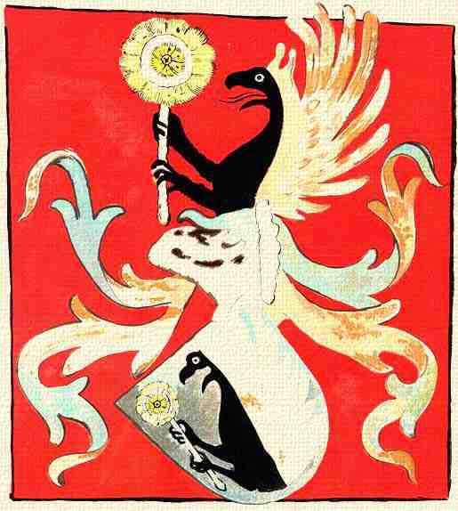 A Bor-család címere, 1415